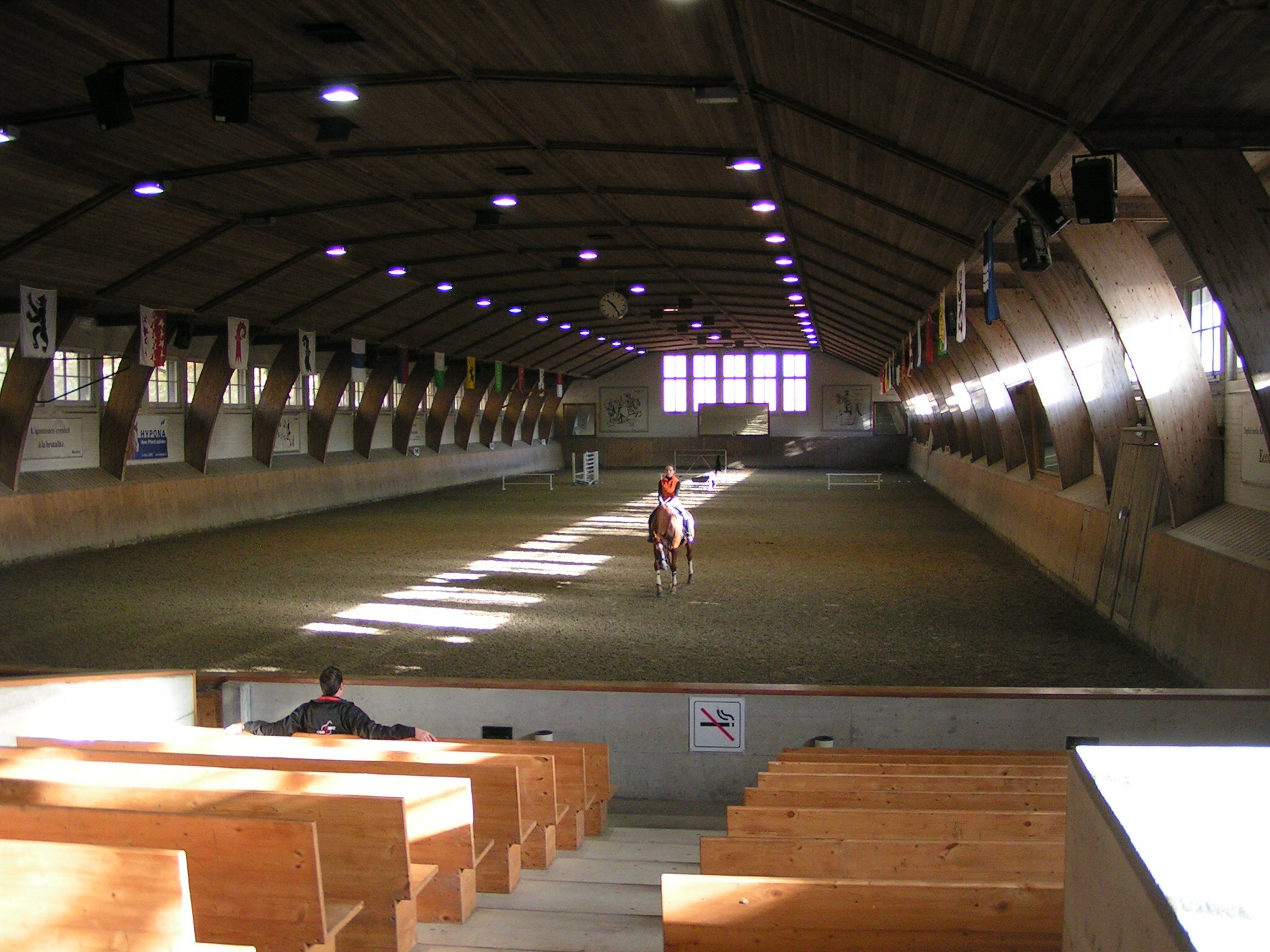 Reitbahn des Nationalen Pferdezentrums Bern